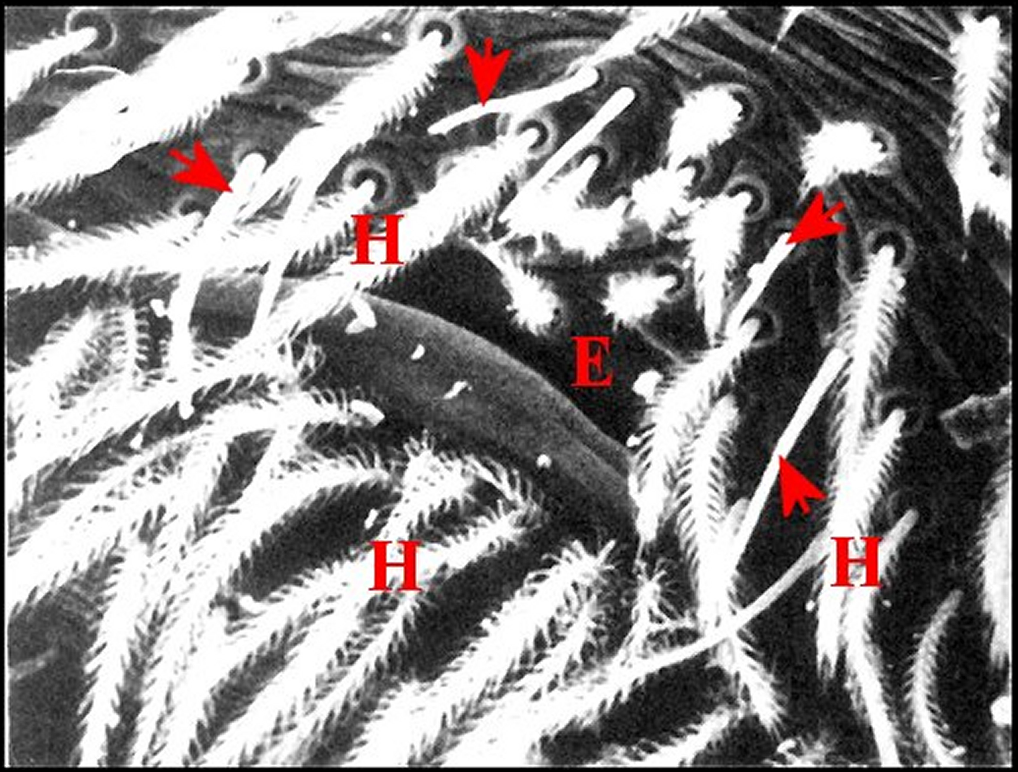 Fusules épigastriques de Salticus scenicus mâle. Microscope électronique à balayage.